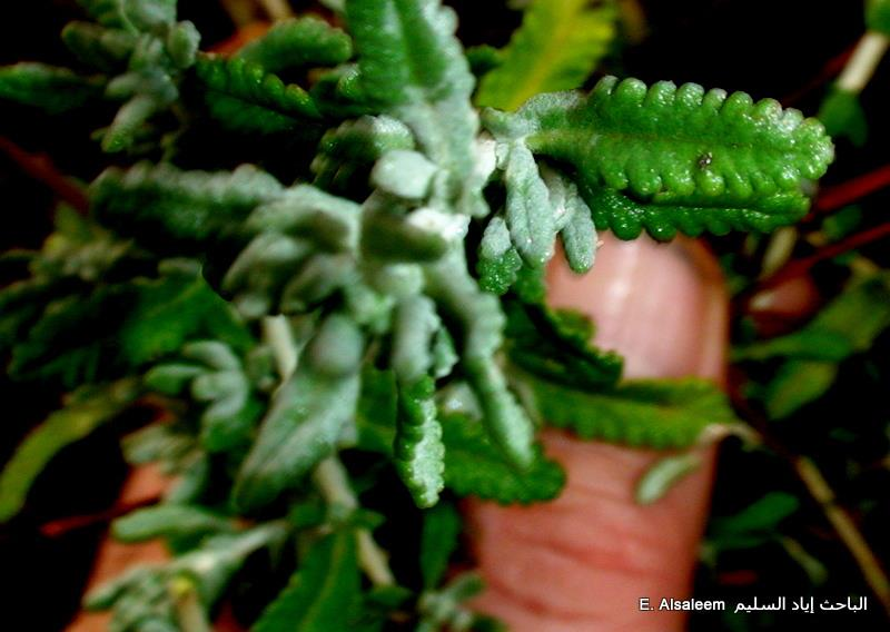 نباتات برّية سورية تؤكل